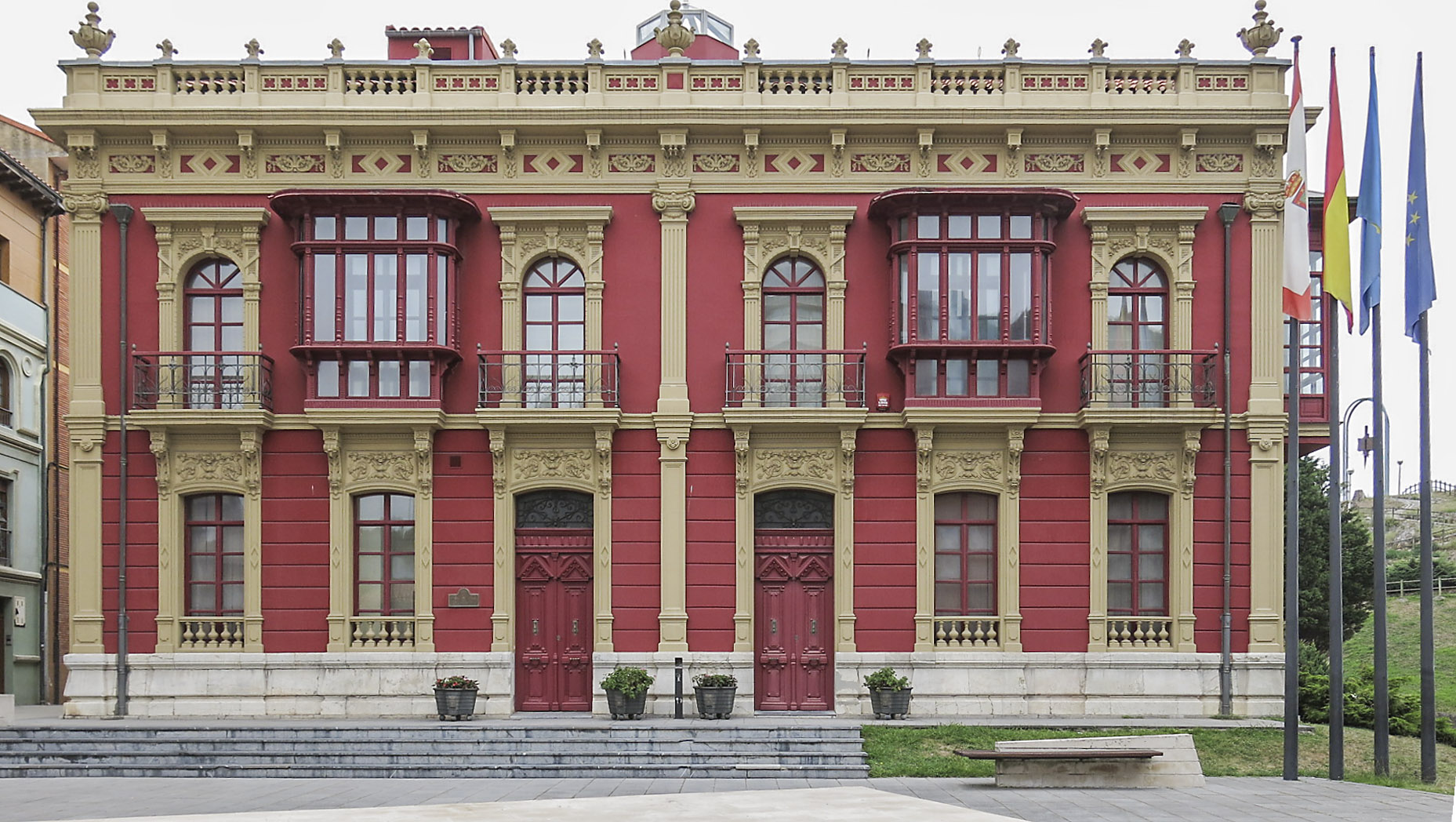 Projecte de col·laboració de l'Arxiu Ismael Latorre Mendoza amb Wikimedia Commons i Amical Wikimedia.